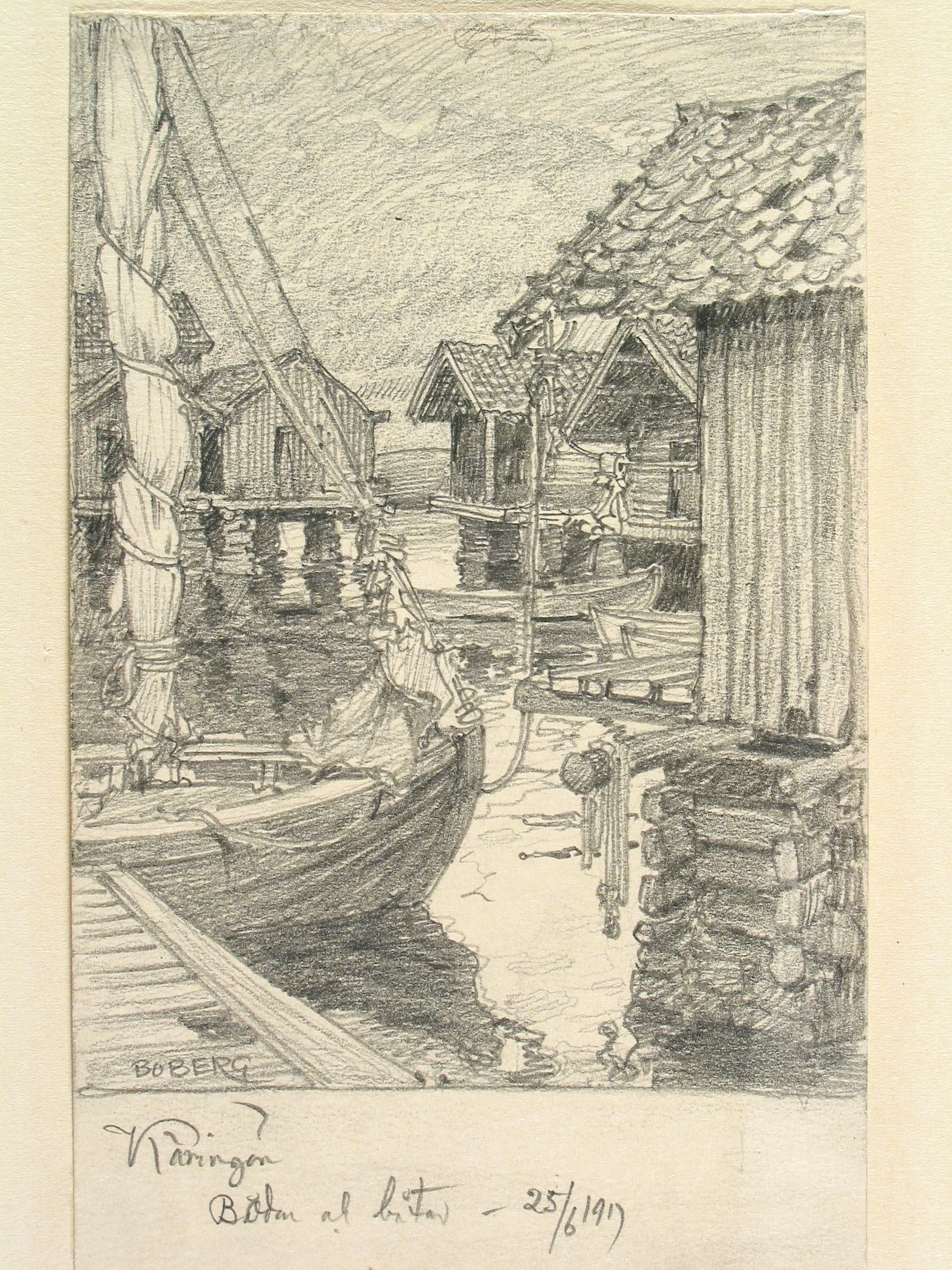 Bohuslän, Käringön. Bodar och båtar. Teckning av Ferdinand Boberg Depicted place: Q10612749 (Q10612749) (Härad), Morlanda sn. (Ort), Käringöns kpfrs., Käringön (Ortnamn därutöver), Sweden (Q34)